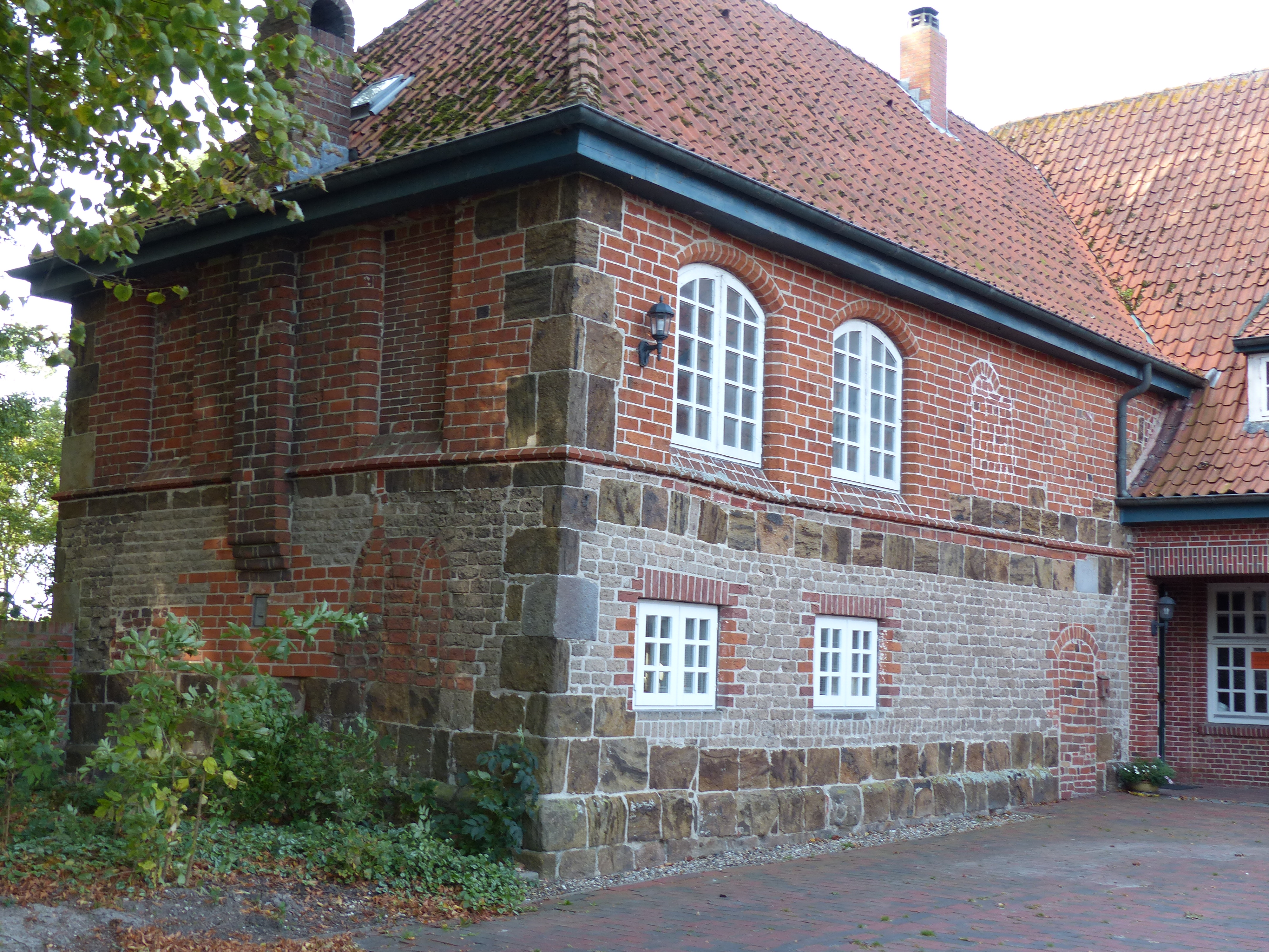 Der Südflügel der Langwardener Pastorei ist ein friesisches Steinhaus aus dem frühen 14. und frühen 16. Jahrhundert.